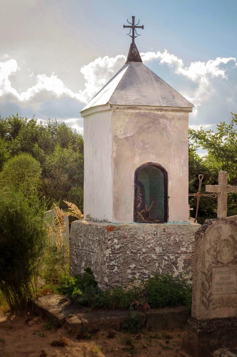 Папшычы. Капліца на могілках